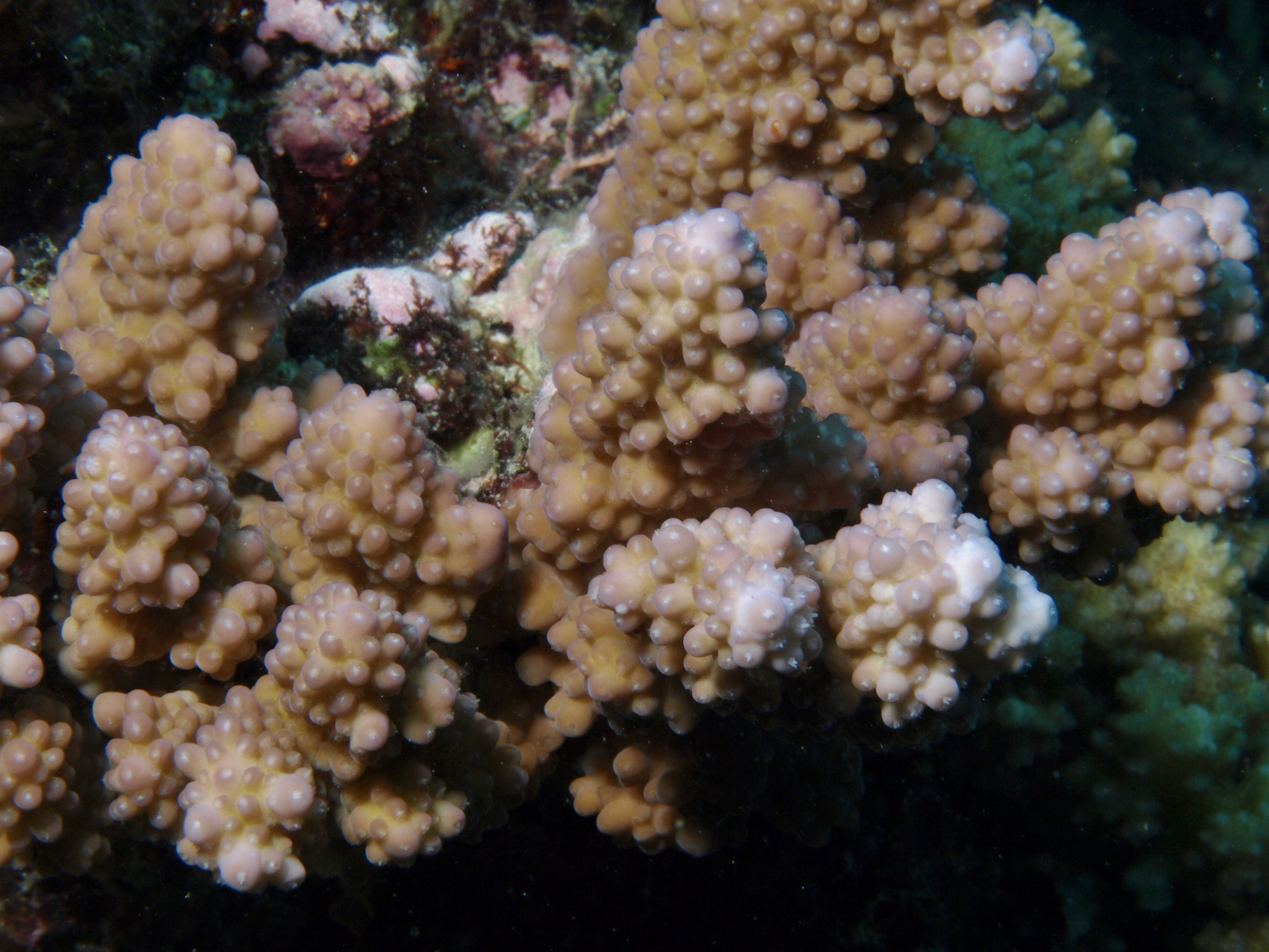 Acropora lutkeni, vista de coralitos, isla Mer, Estrecho de Torres, Australia